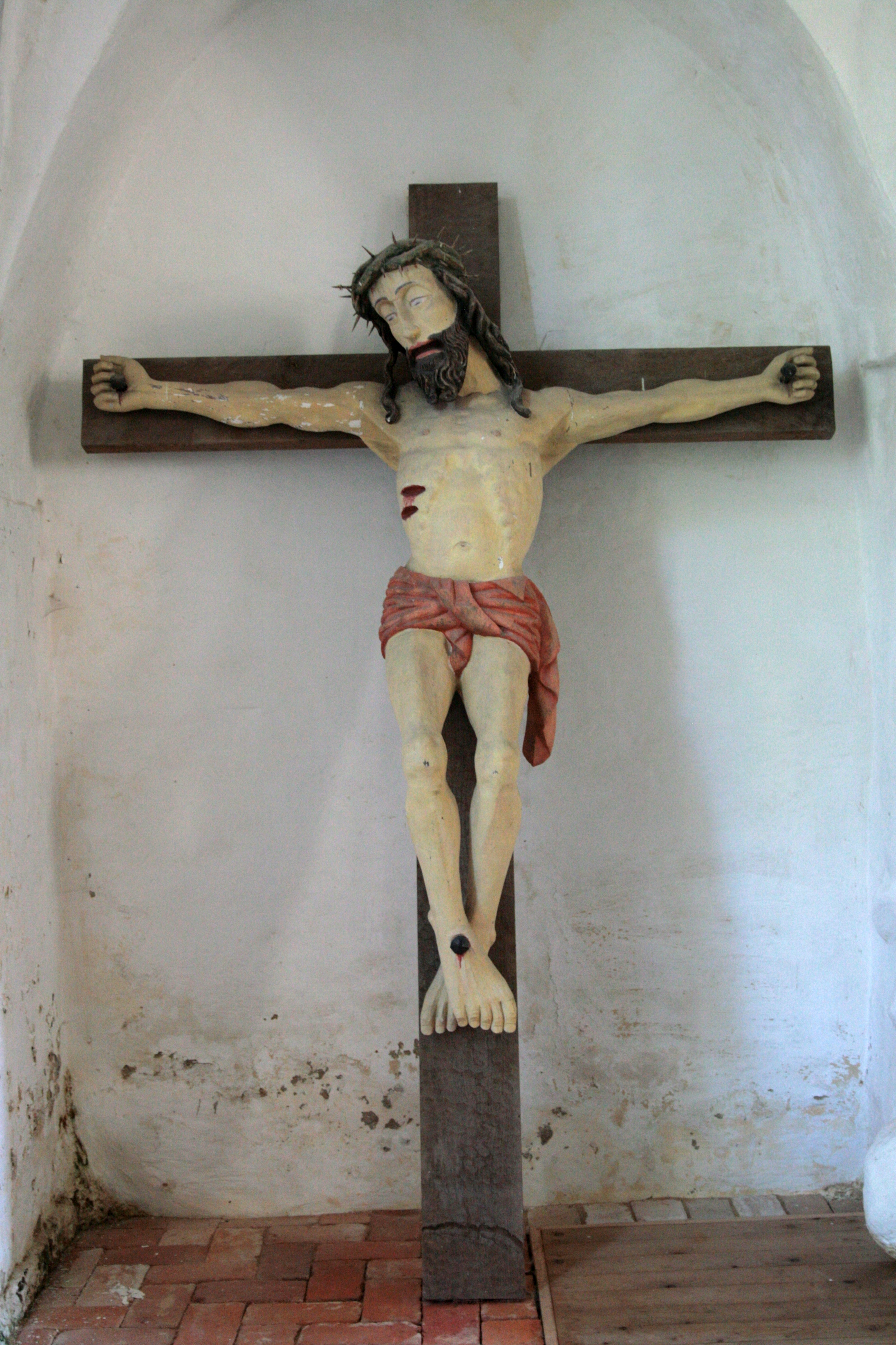 Sagard, St.Michael: Triumphkreuz